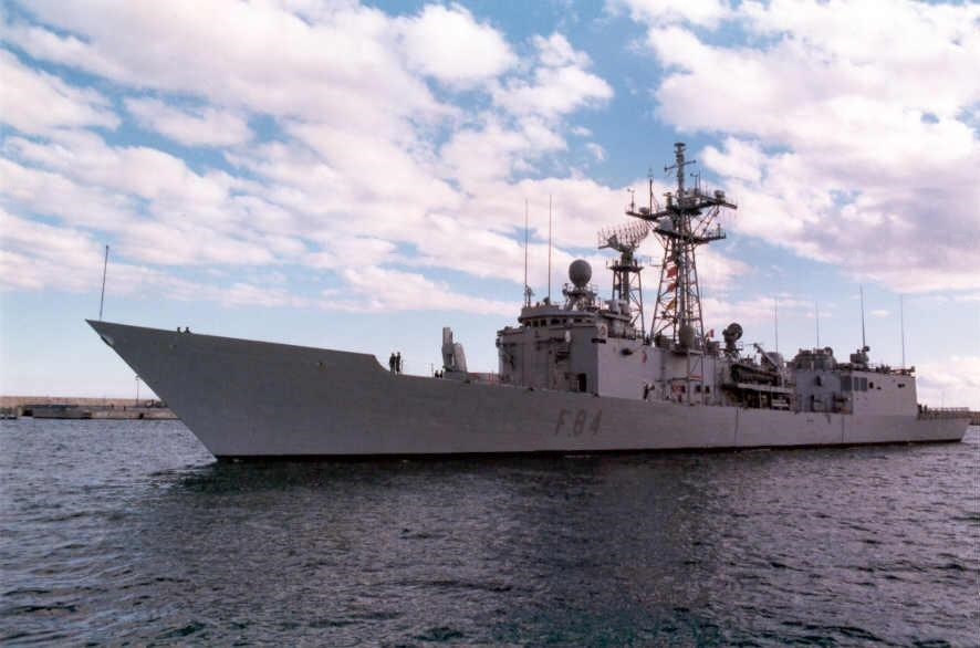 Fragata Reina Sofía (F-84), de la Armada Española, perteneciente a la Clase Santa María, en Málaga.